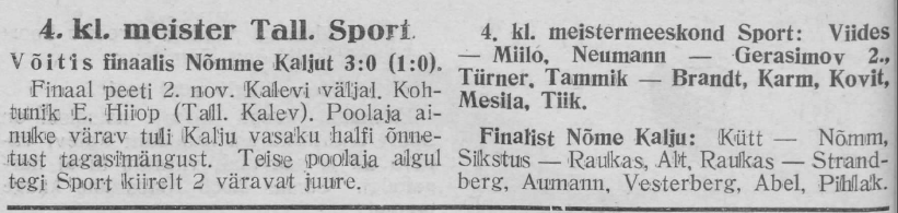 4. klassi meister VS Sport 4. meeskond